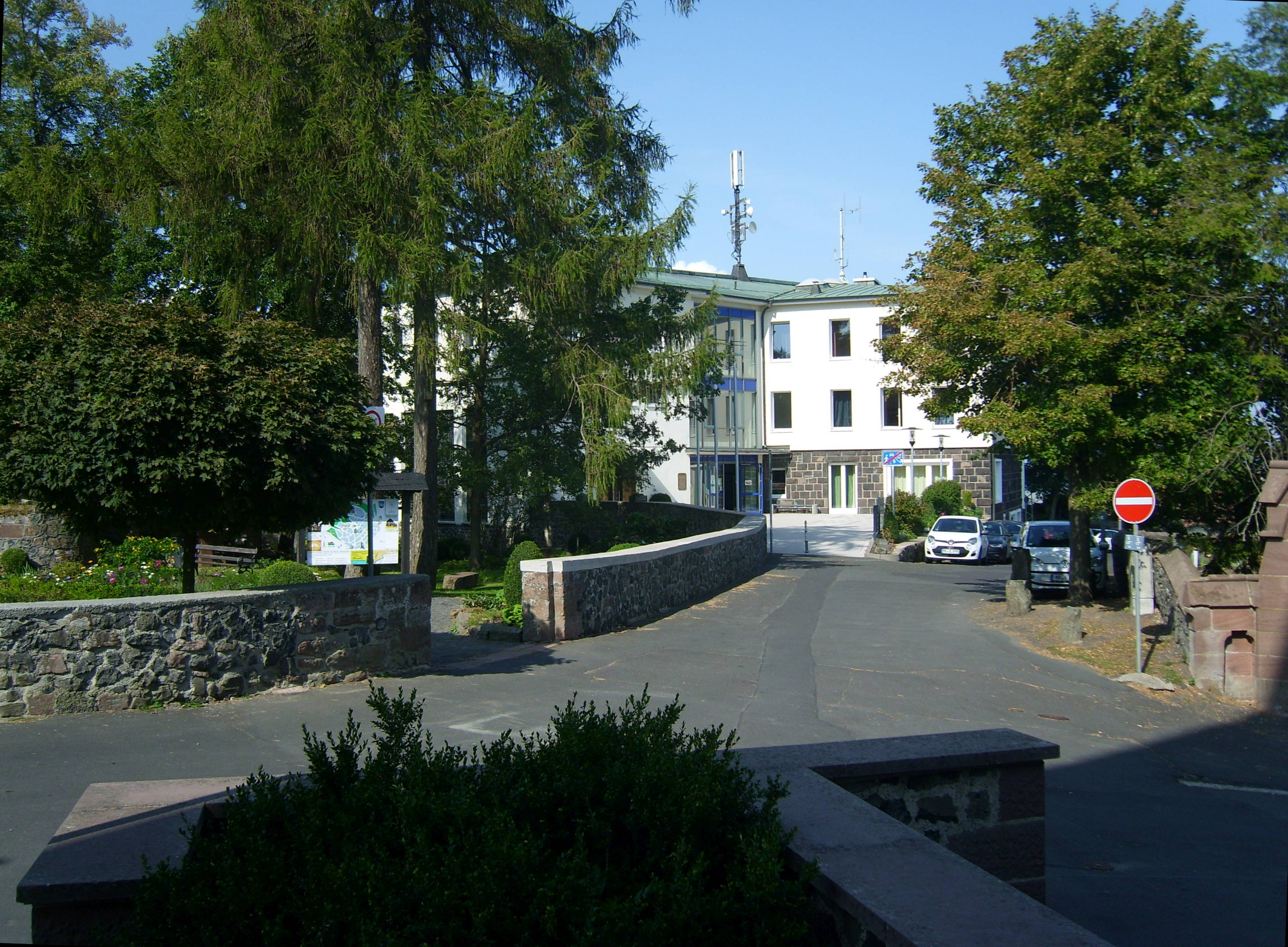 Das Rabanushaus der Stiftsschule St. Johann in Amöneburg; links der Innenhof der Burg Amöneburg.